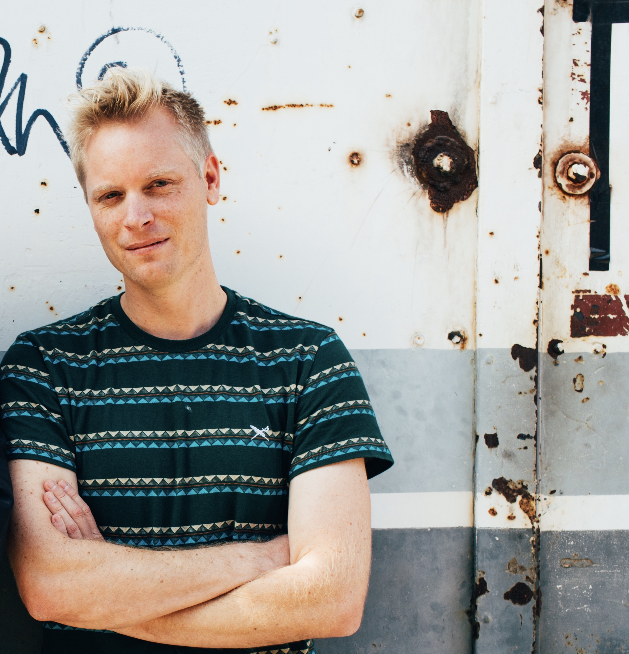 Stijn Vlaeminck, presentator op Studio Brussel